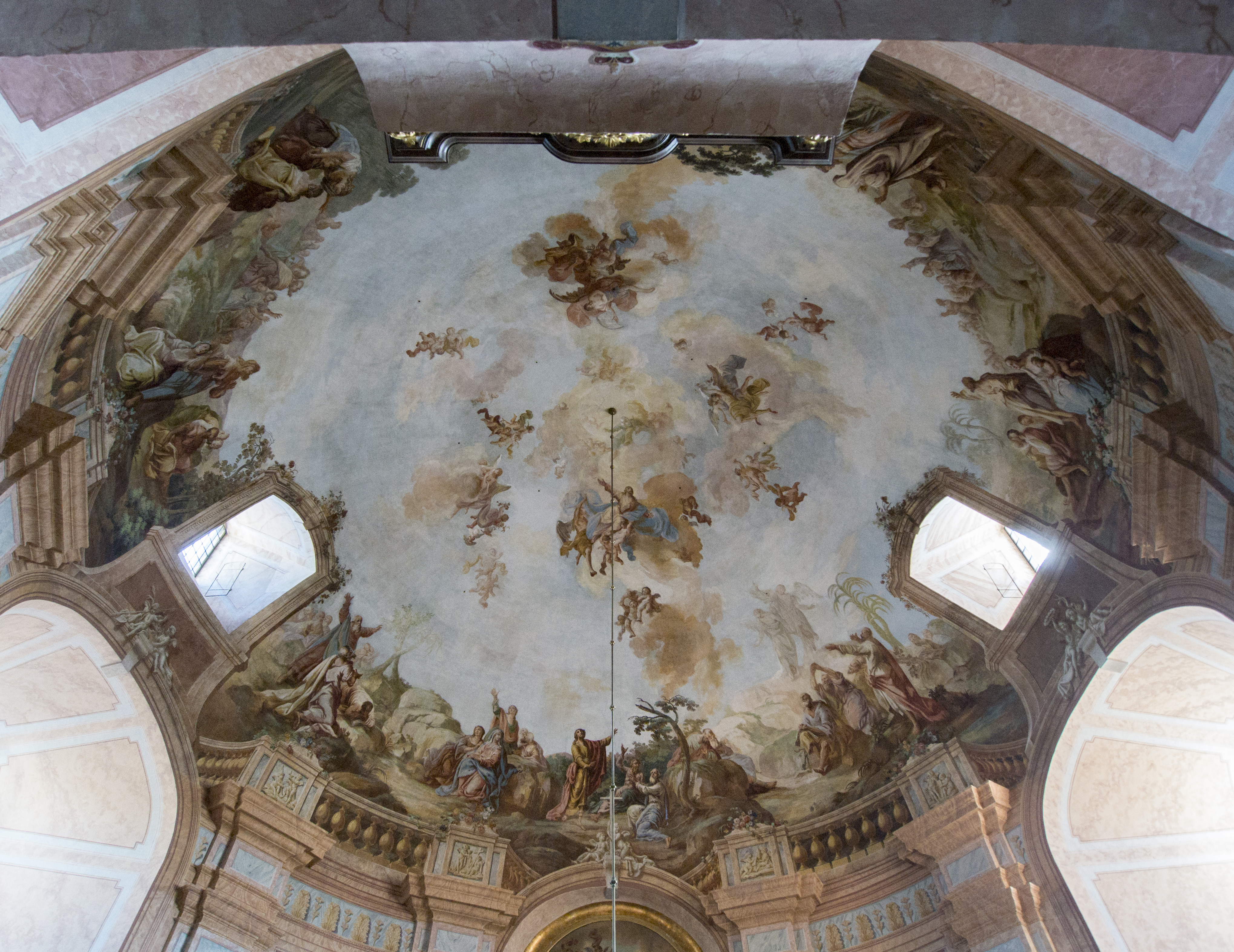 Bergkirche Heimsuchung Mariae, Deckenmalerei